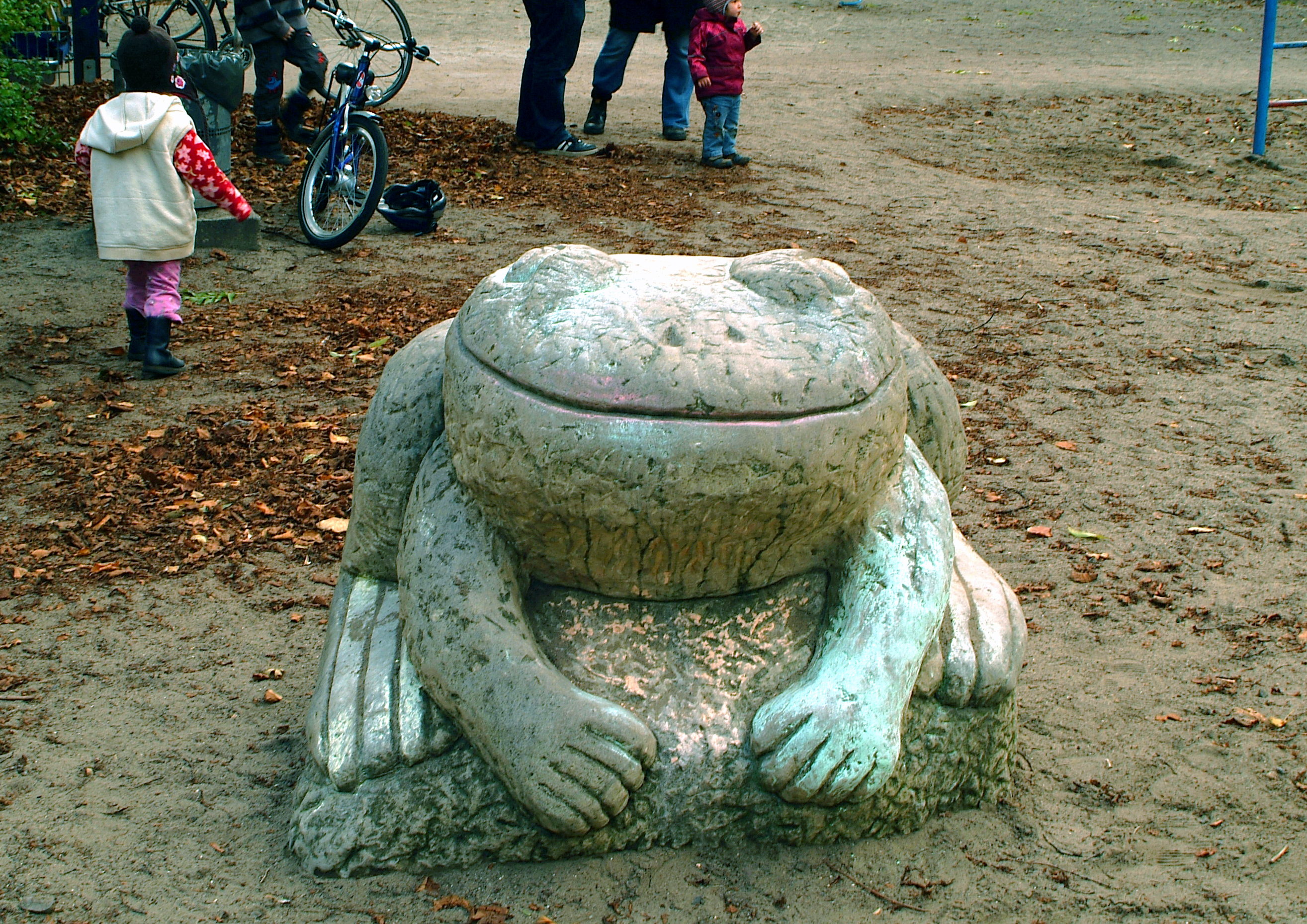 Ein wirklich Dicker Frosch, geschaffen von dem Bildhauer Wolfgang Supper und aufgestellt auf dem Kinderspielplatz in der Pfarrlandstraße in Hannovers Stadtteil Linden Nord